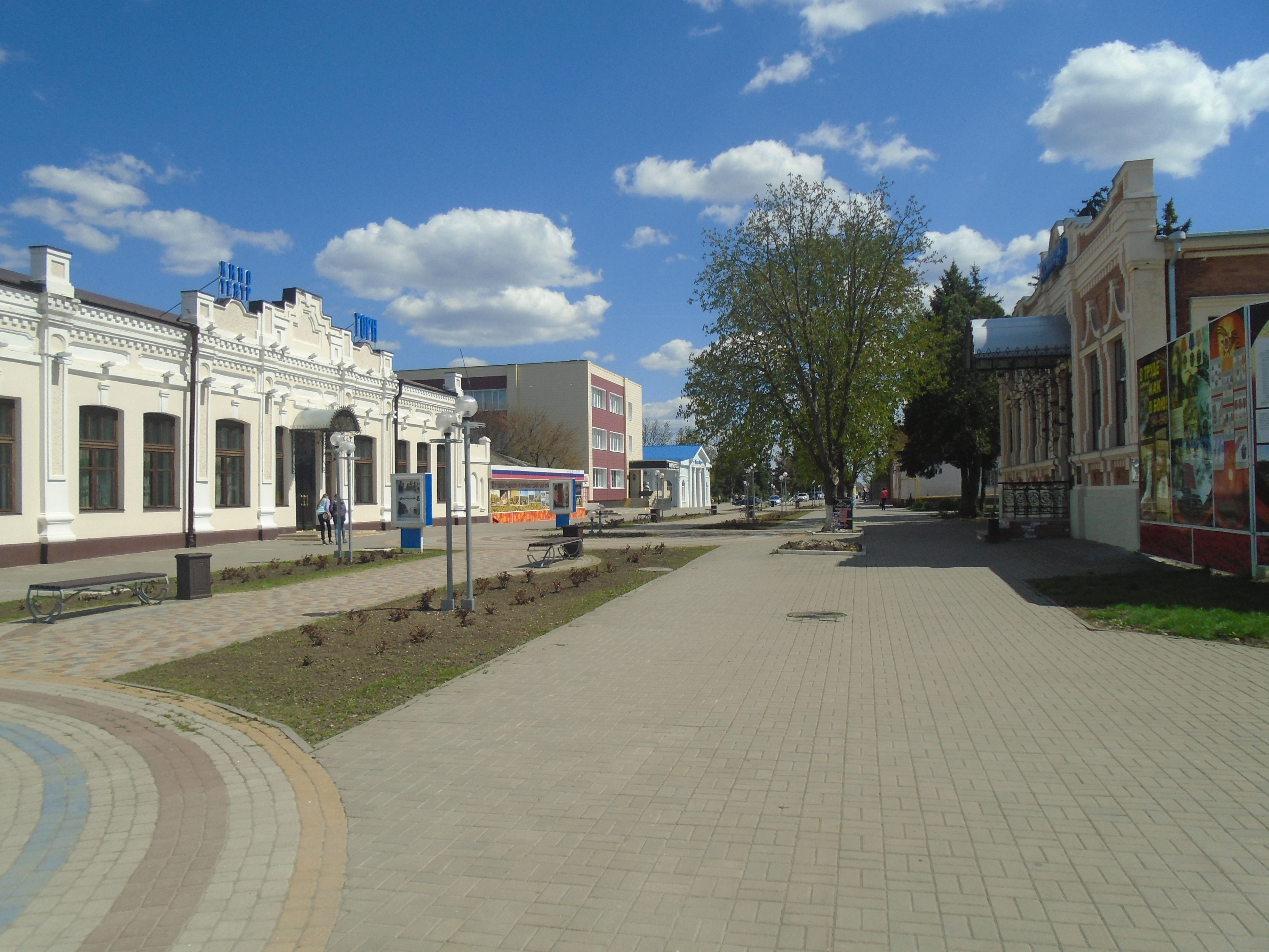 3D Кинотеатр "Горн"